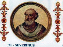 Pope Severinus